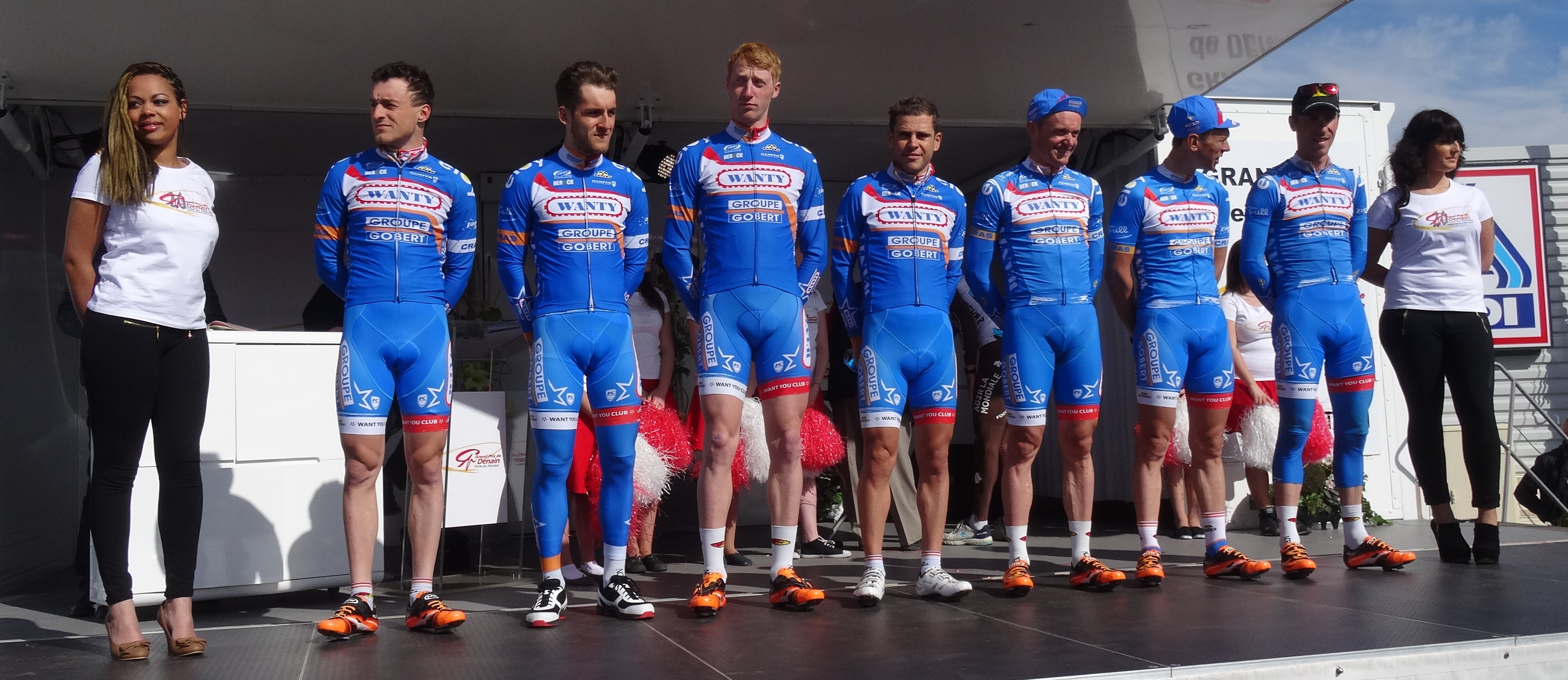 Reportage réalisé le jeudi 17 avril à l'occasion du départ et de l'arrivée du Grand Prix de Denain 2014 à Denain, Nord, Nord-Pas-de-Calais, France.